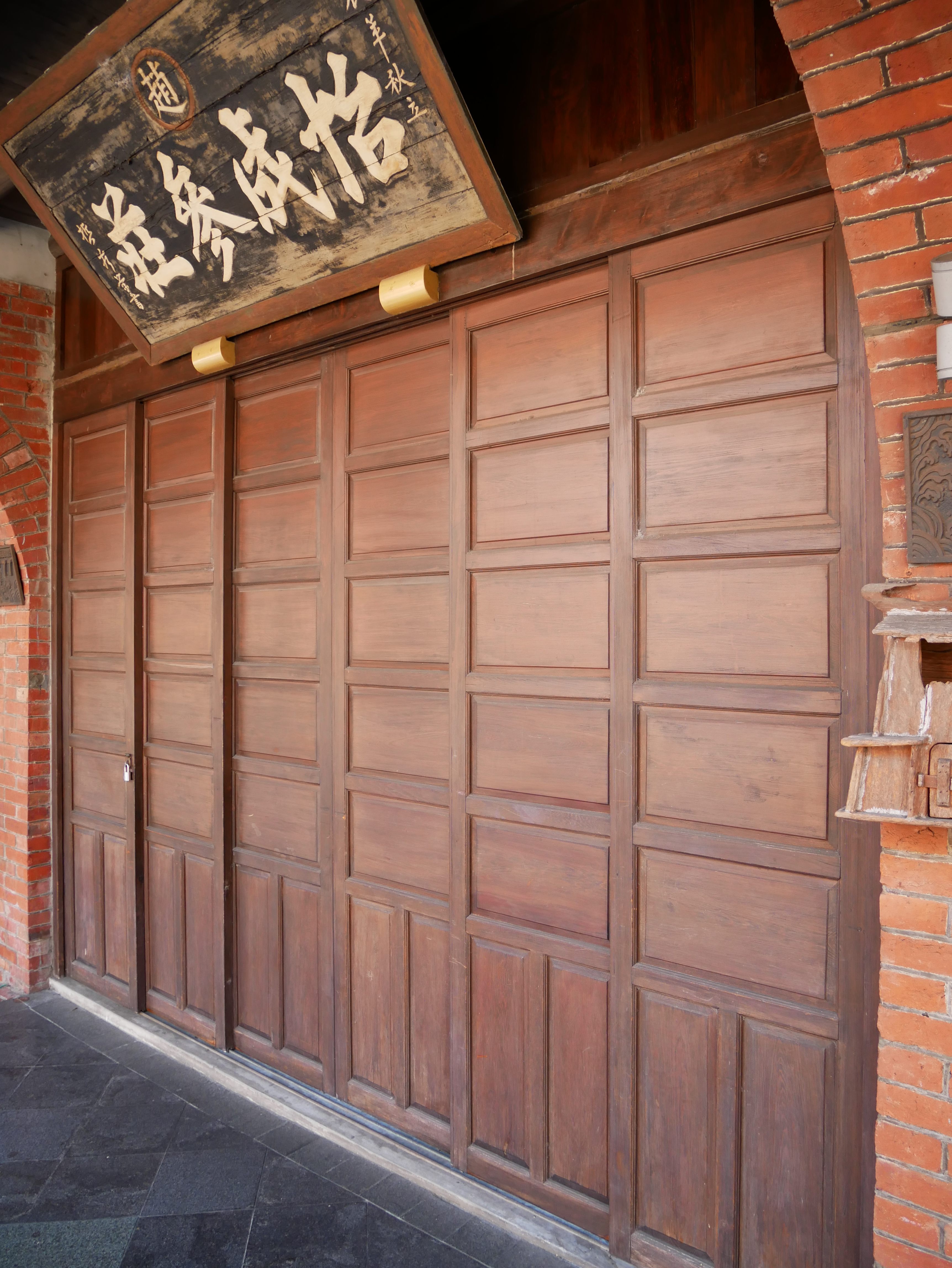 中文（台灣）: 三峽老街趙怡成參行店面，新北市三峽區三峽里